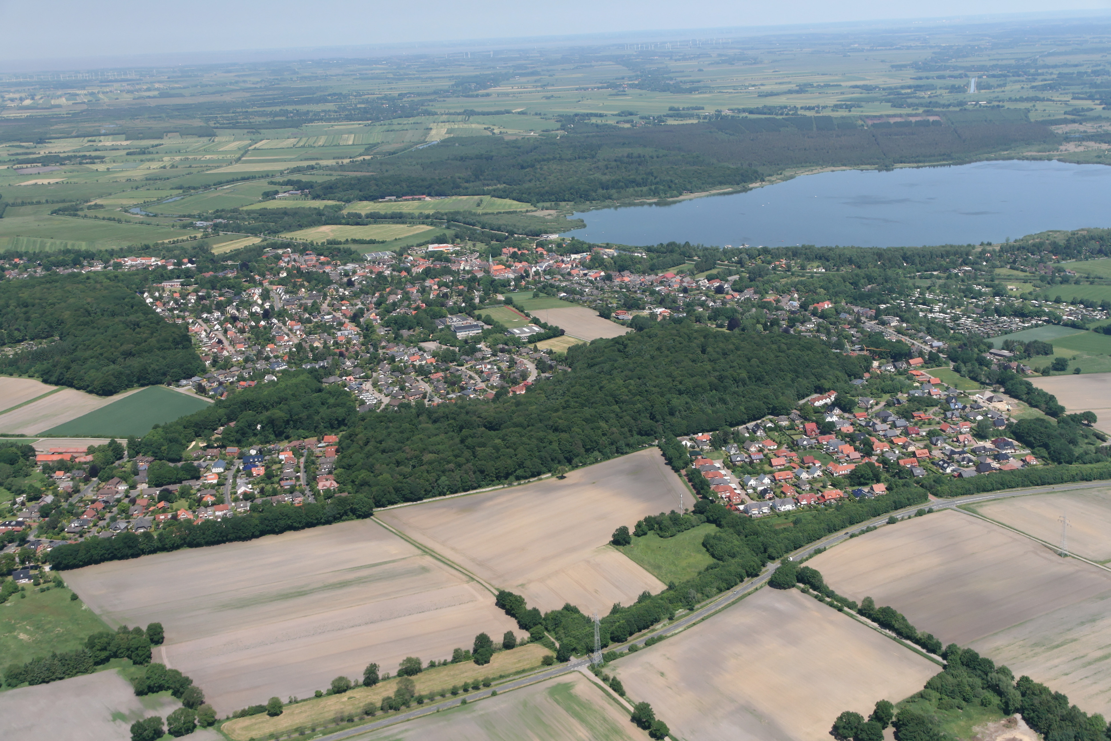 Bad Bederkesa